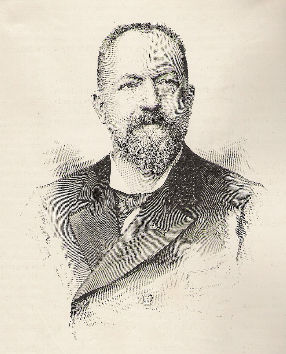 Alexandre Lapissida, directeur de la scène au théâtre national de l'Opéra (de Paris), 1892